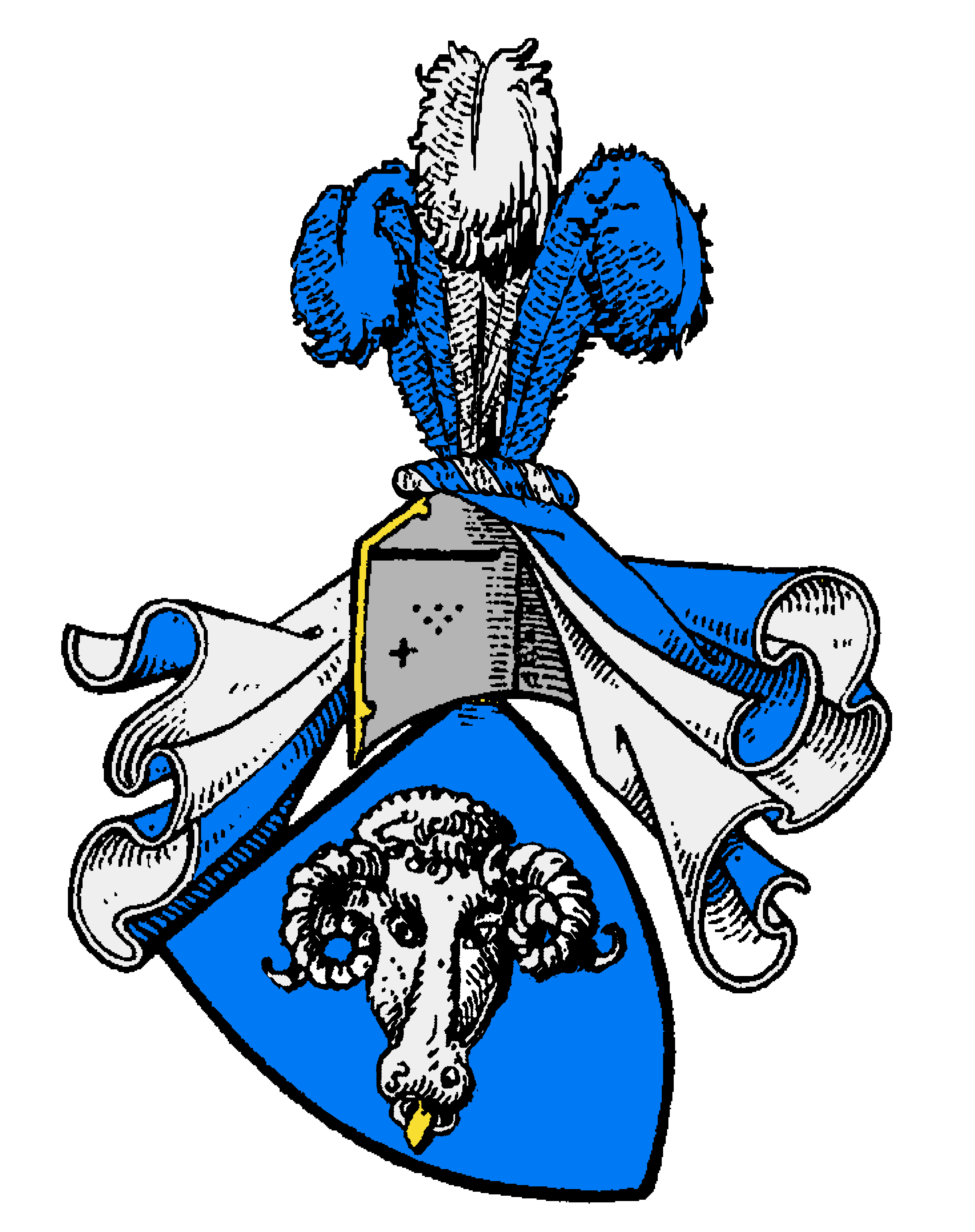 Wappen der Benckendorf, häufiger Beneckendorff, vereinzelt auch Benkendorff, neumärkischer und meißnerischer Uradel und nicht zu verwechseln mit dem mittelmärkischen Adelsgeschlecht von Benckendorff in Brandenburg, bzw. Bayreuth in Oberfranken.